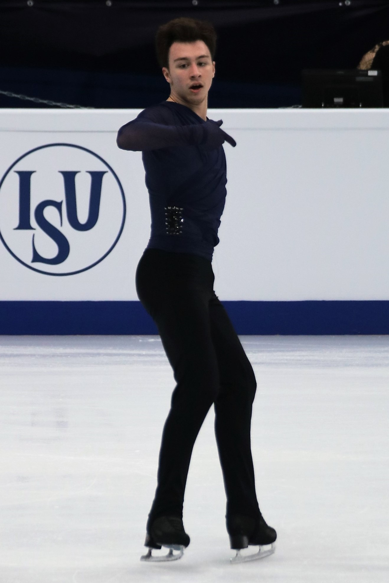 Дмитрий Алиев (Россия) на Чемпионате Европы по фигурному катанию 2018.